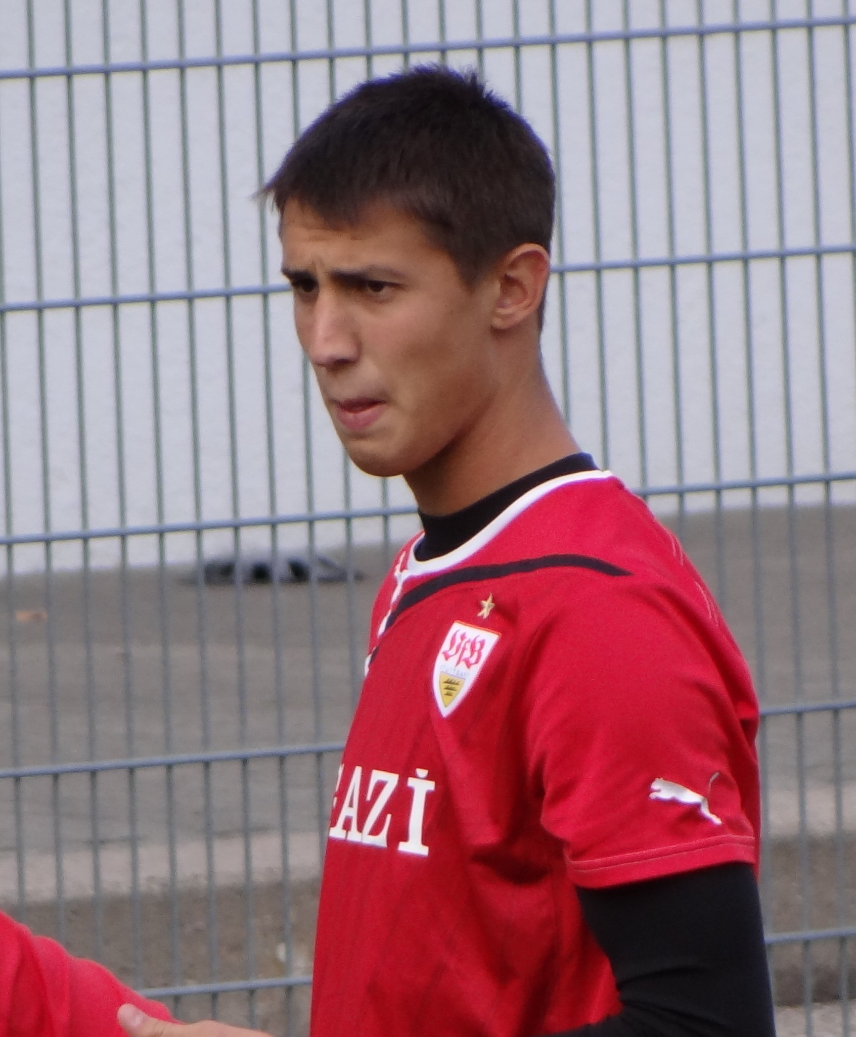 Odisseas Vlachodimos beim Training der VfB- Profis. Aufgenommen von